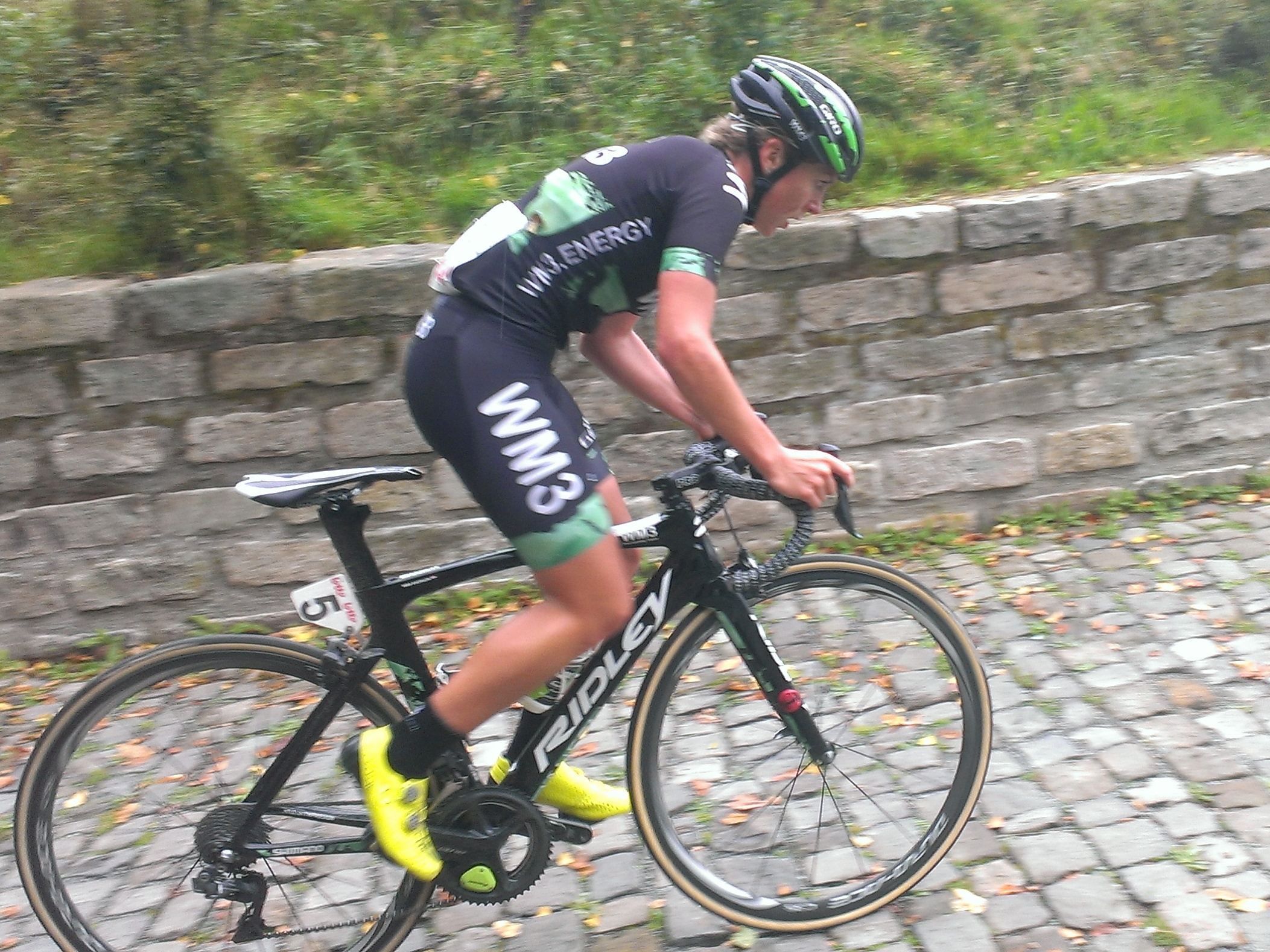 3e en laatste etappe van de Lotto Belgium Tour 2017 op de Muur / Kapelmuur van Geraardsbergen.